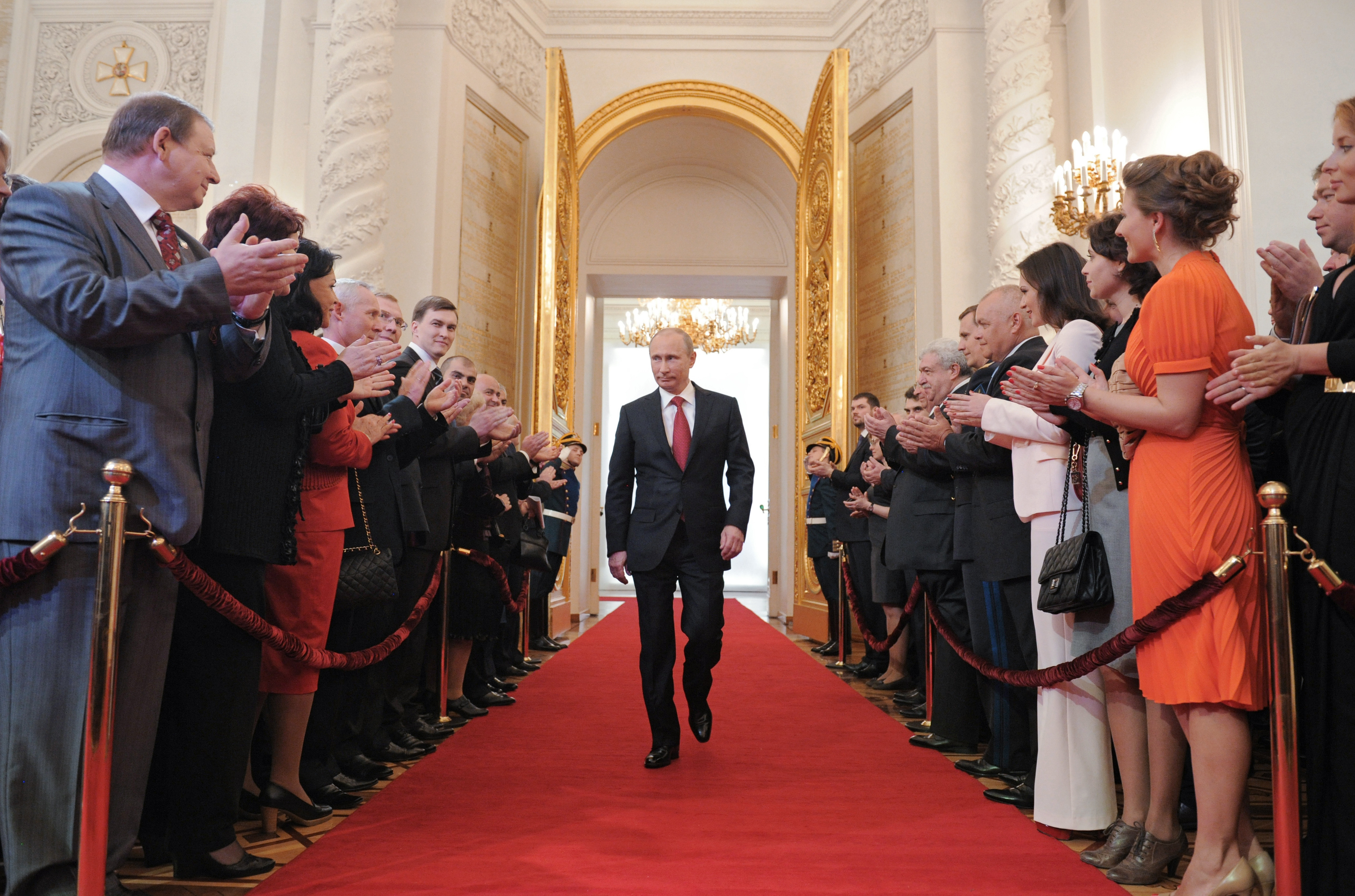 La ceremonia de inauguración de Vladímir Putin como Presidente de Rusia.